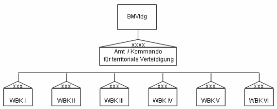 Gliederung der Territorialreserve der Bundeswehr 1957 - 1969